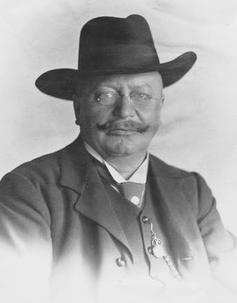 Per Karl Wahlström, bokförläggare